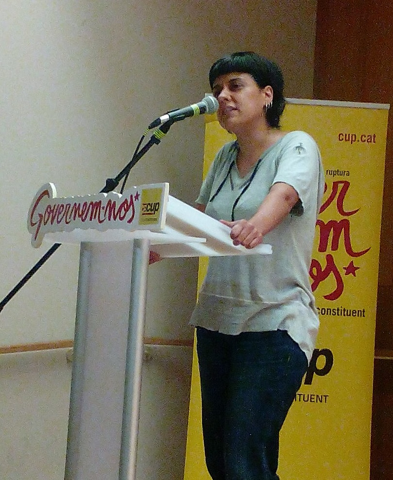 Anna Gabriel i Sabaté en un acte de la CUP-Crida Constituent al Centre Cultural la Violeta (Gràcia, Barcelona, Catalunya, Països Catalans)